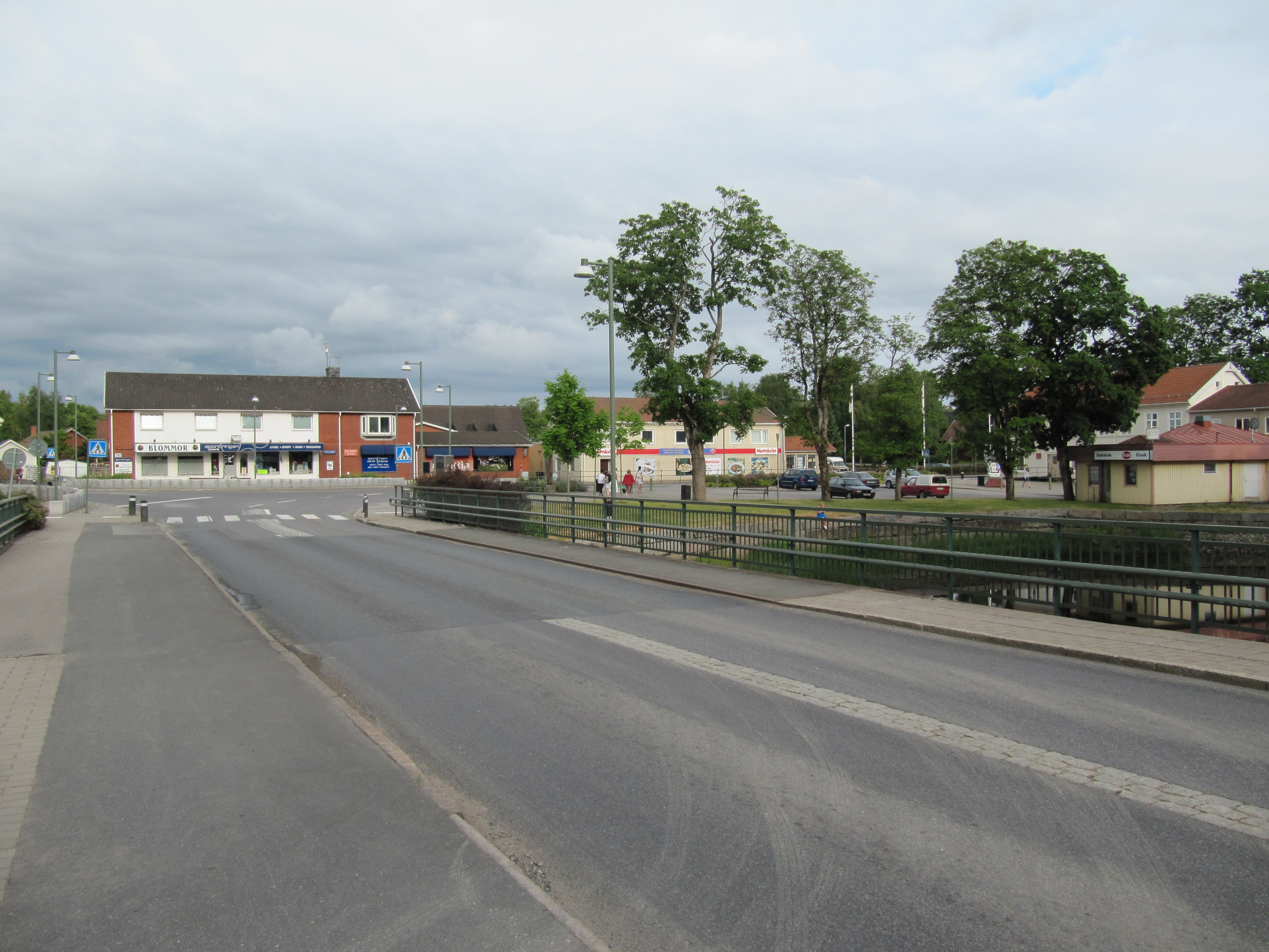 Vy åt öster från bron över Vrigstadsån. Kombinerade riksväg 30 och länsväg 127 går över bron. Därefter delar sig vägen med riksväg 30 åt höger och länsväg 127 åt vänster.